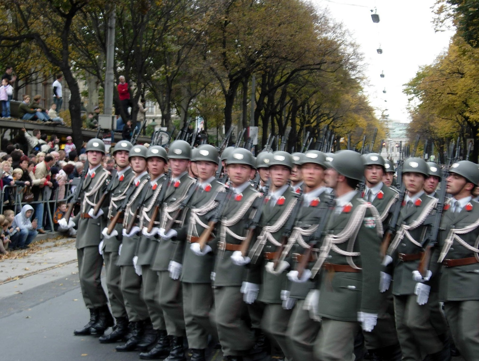 2005 Militärparade Wien Okt.26. 172